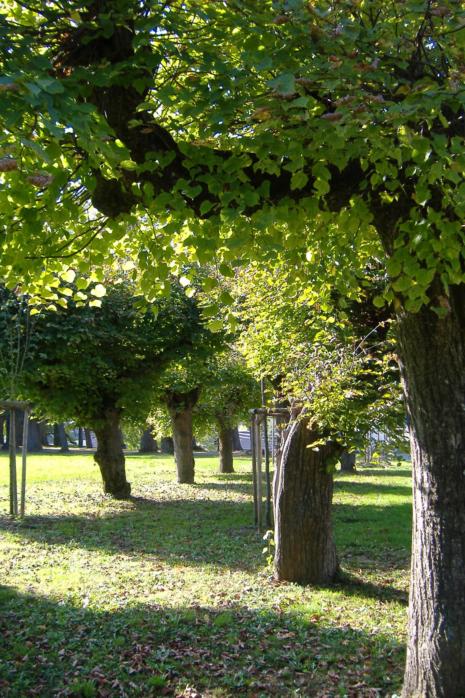 Bertholdsheim